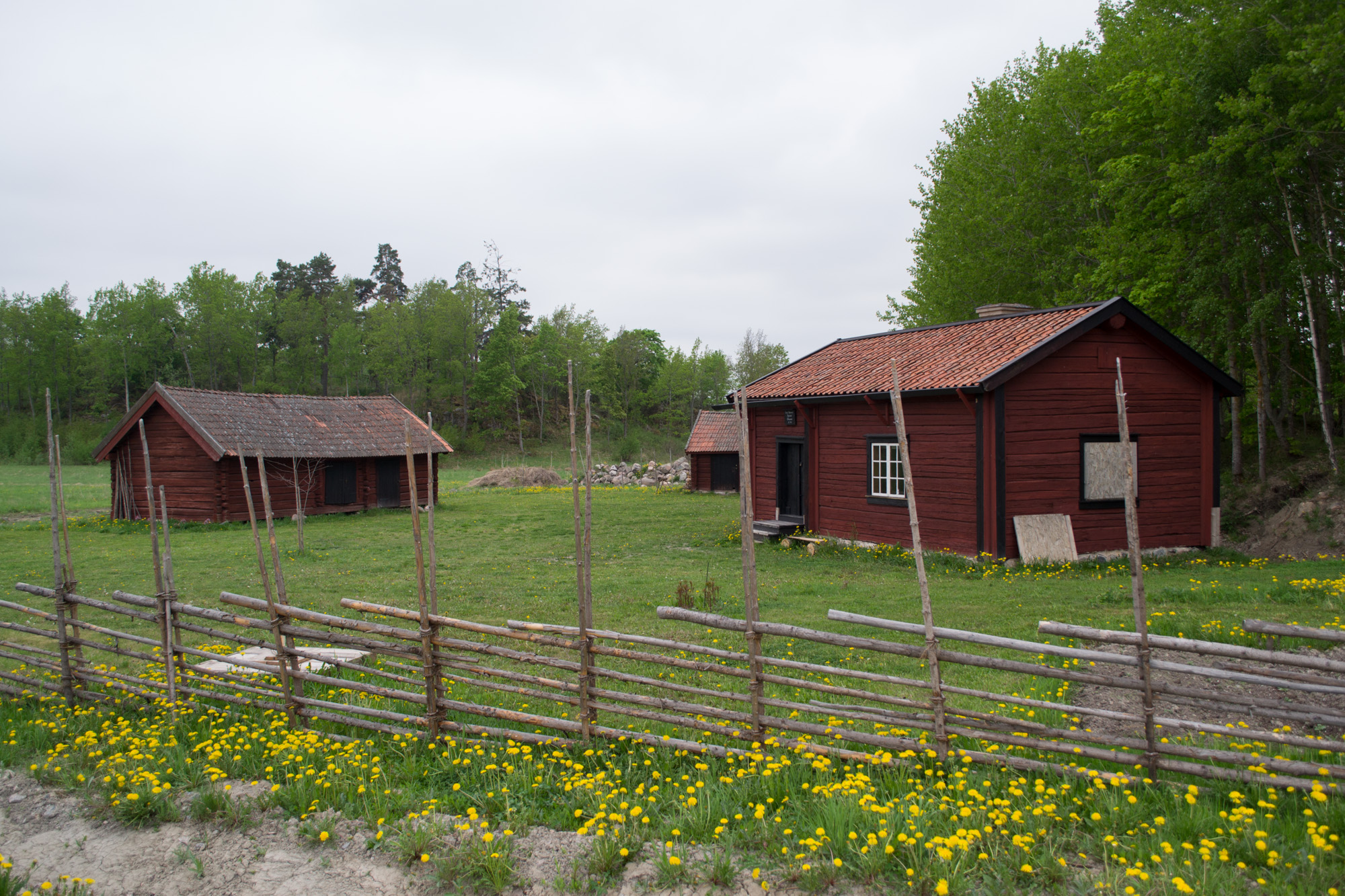 Soldattorp